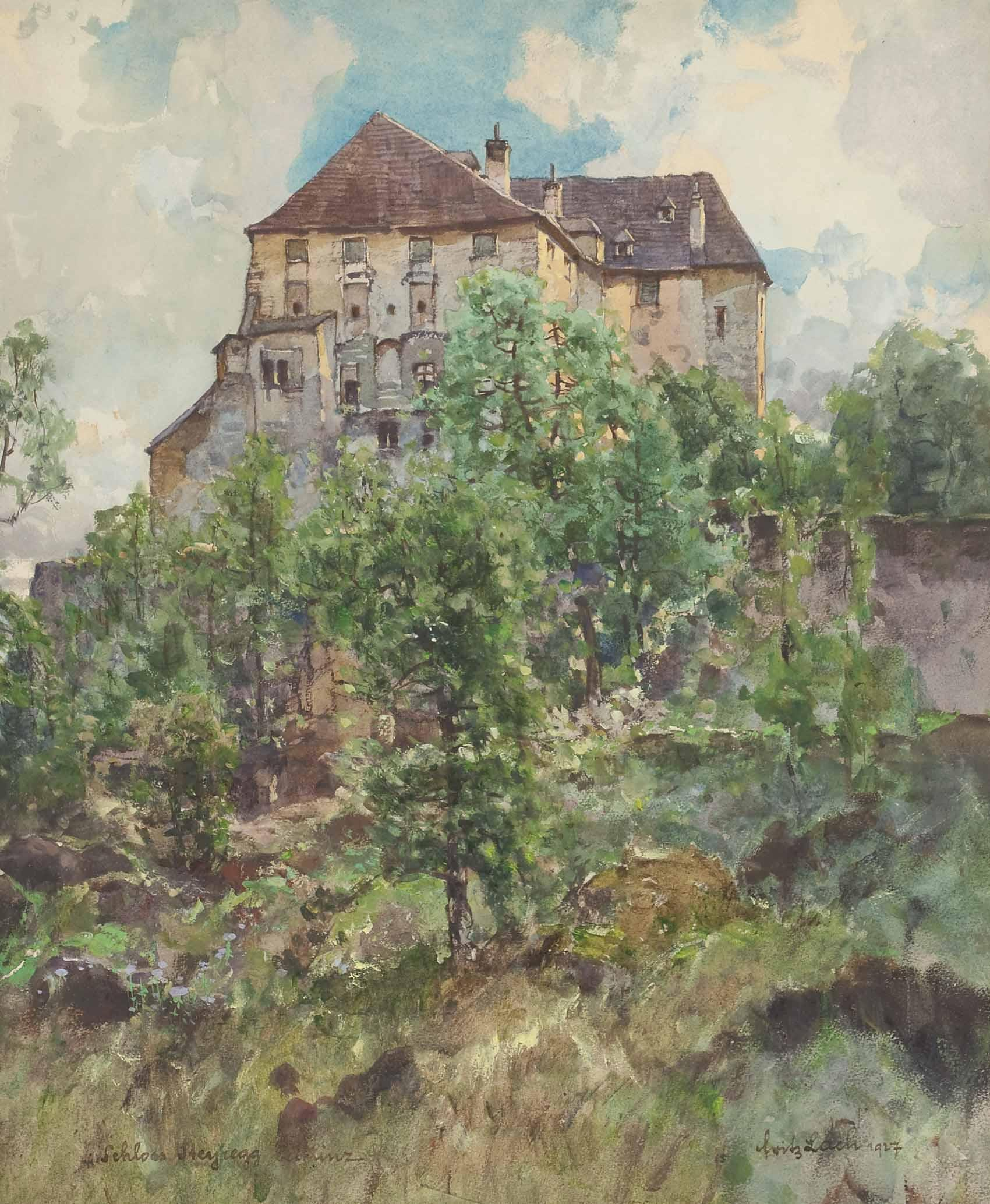 Schloß Steyregg in Linz